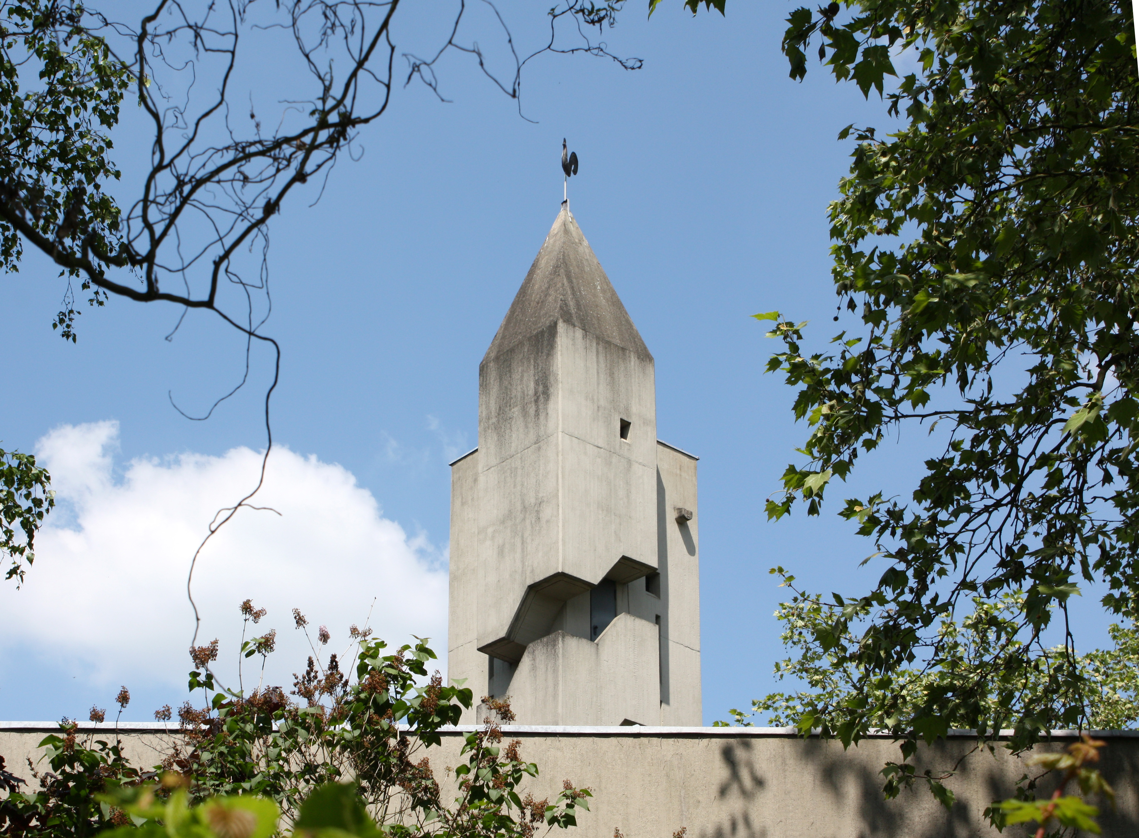 Heilig-Geist-Kirche, Erkrath-Hochdahl, Sandheide